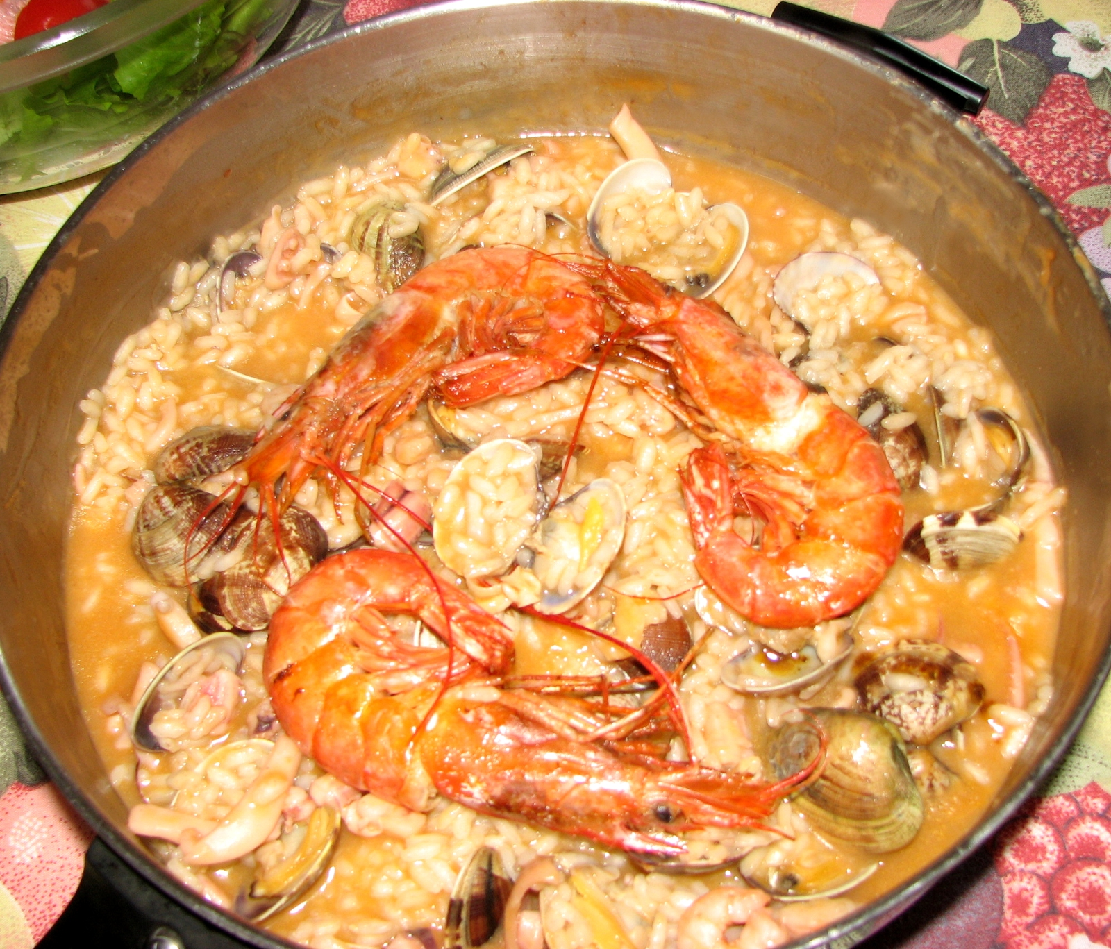 See title